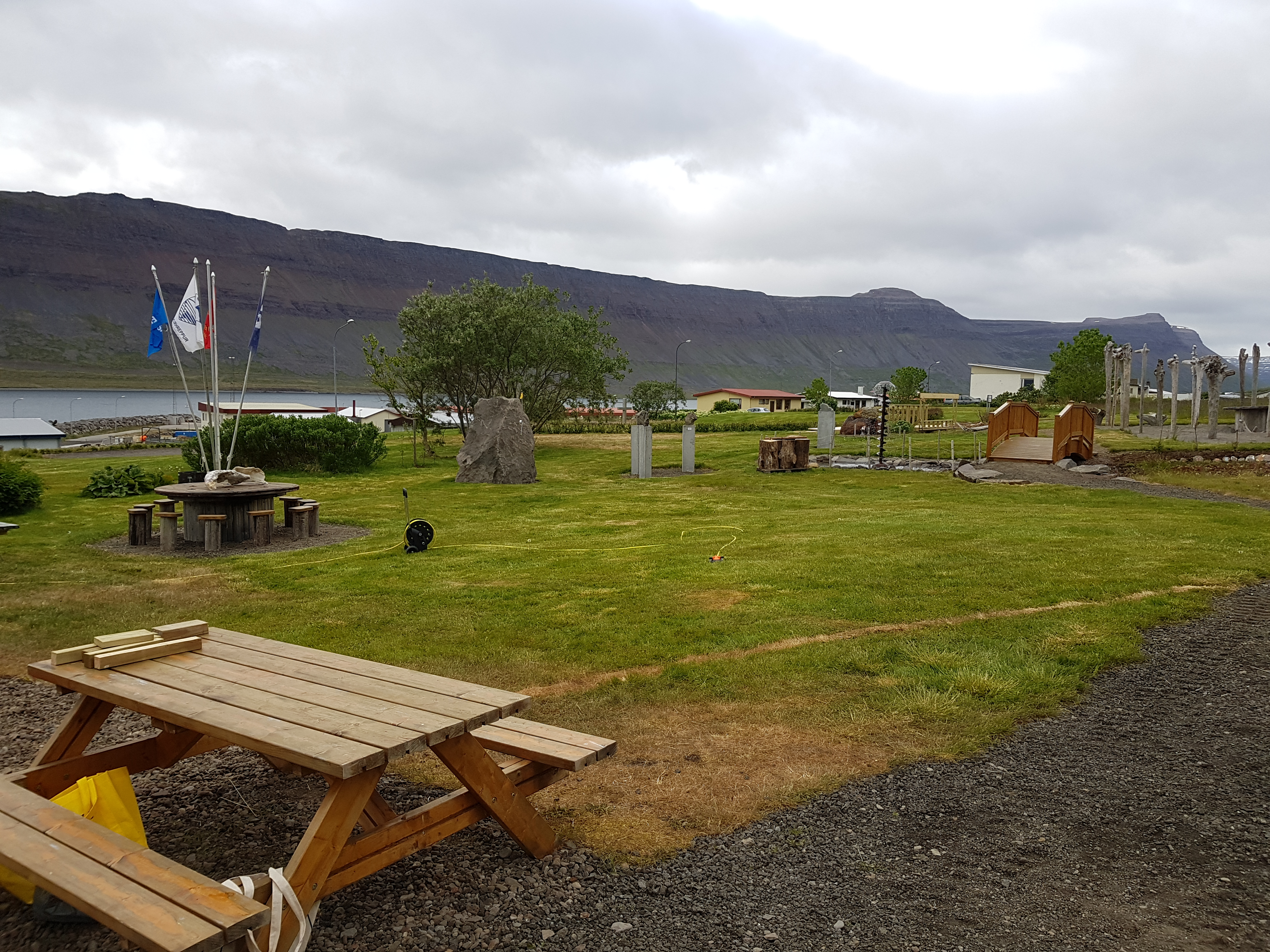 Boggutún í Raggagarði (Súðavík).